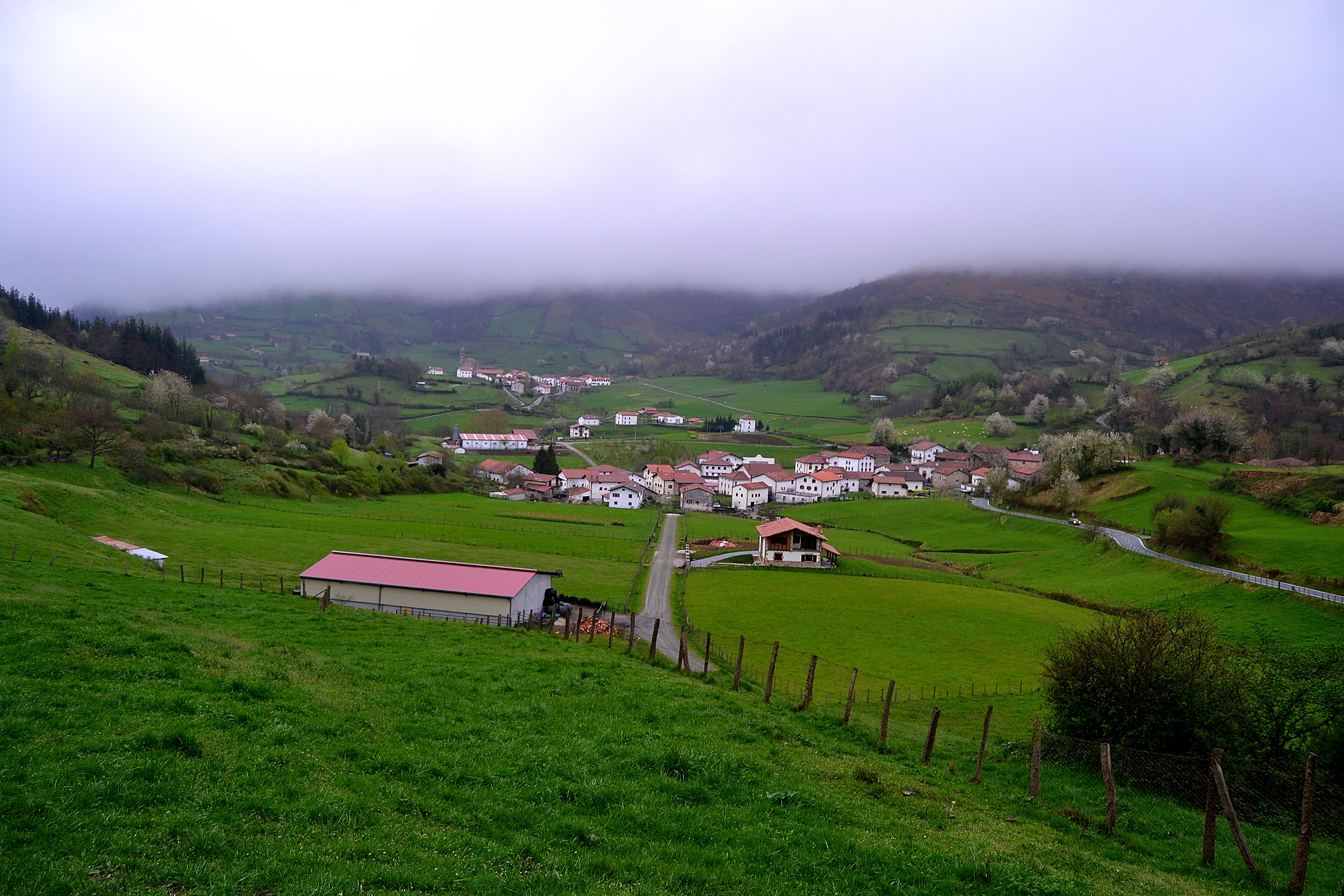 Beintza-Labaien udalerria. Malerreka, Nafarroa. Euskal Herria. Beintza-Labaien village. Malerreka, Navarre. Basque Country.